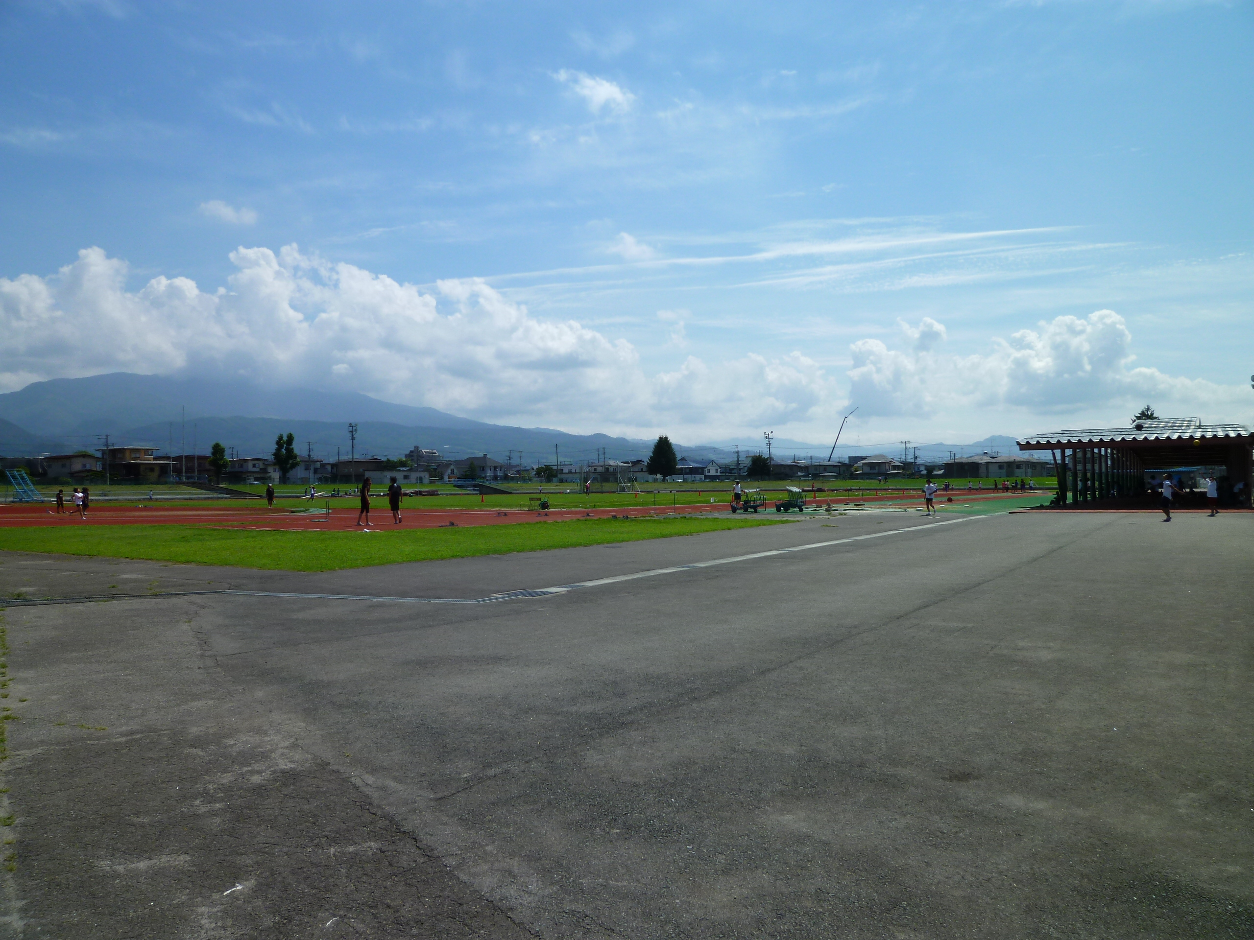 山形県あかねヶ丘陸上競技場 競技場内